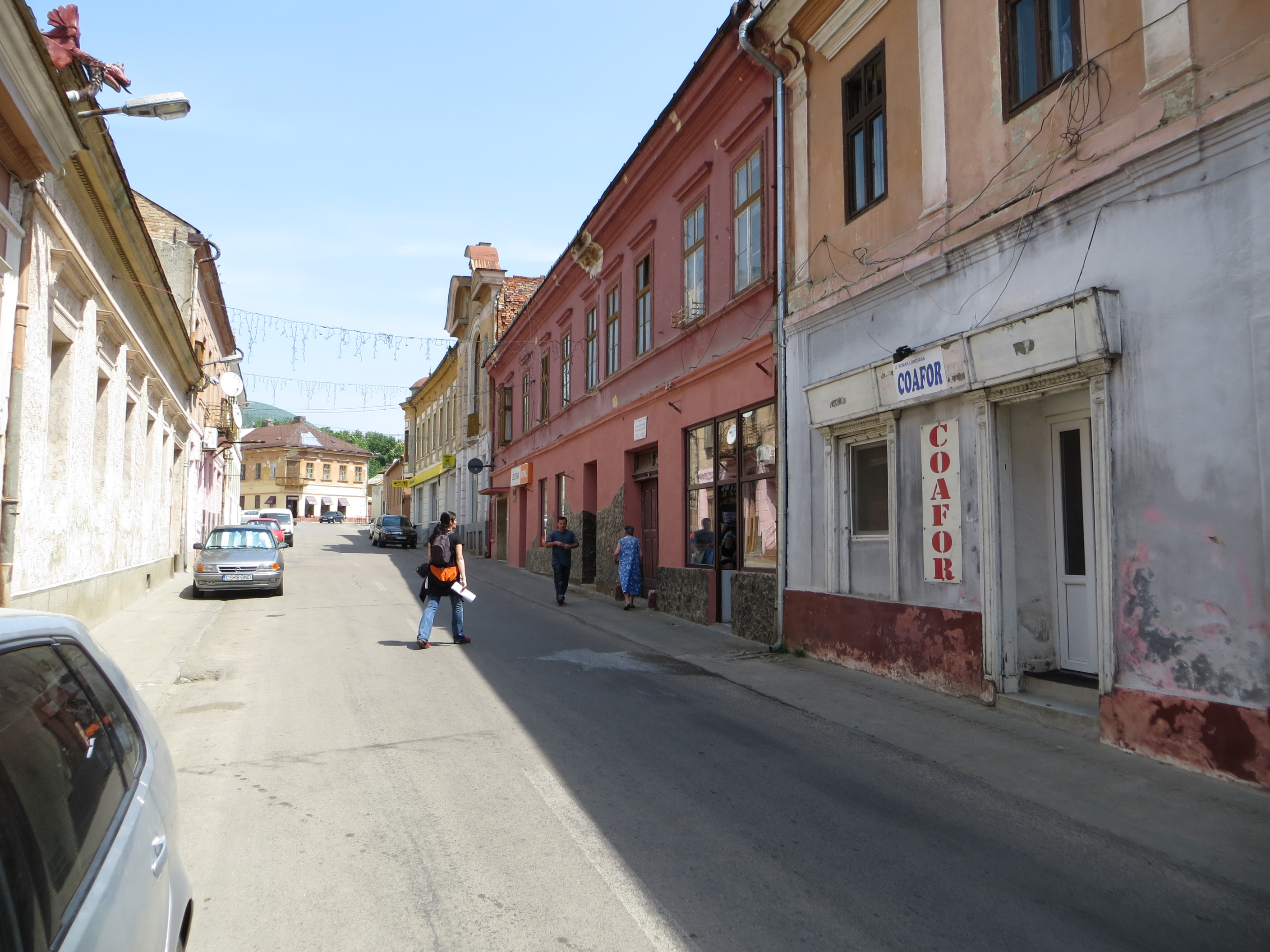 Clădire, azi Casa de cultură "M. Eminescu", locuințe șispațiu comercial la parter